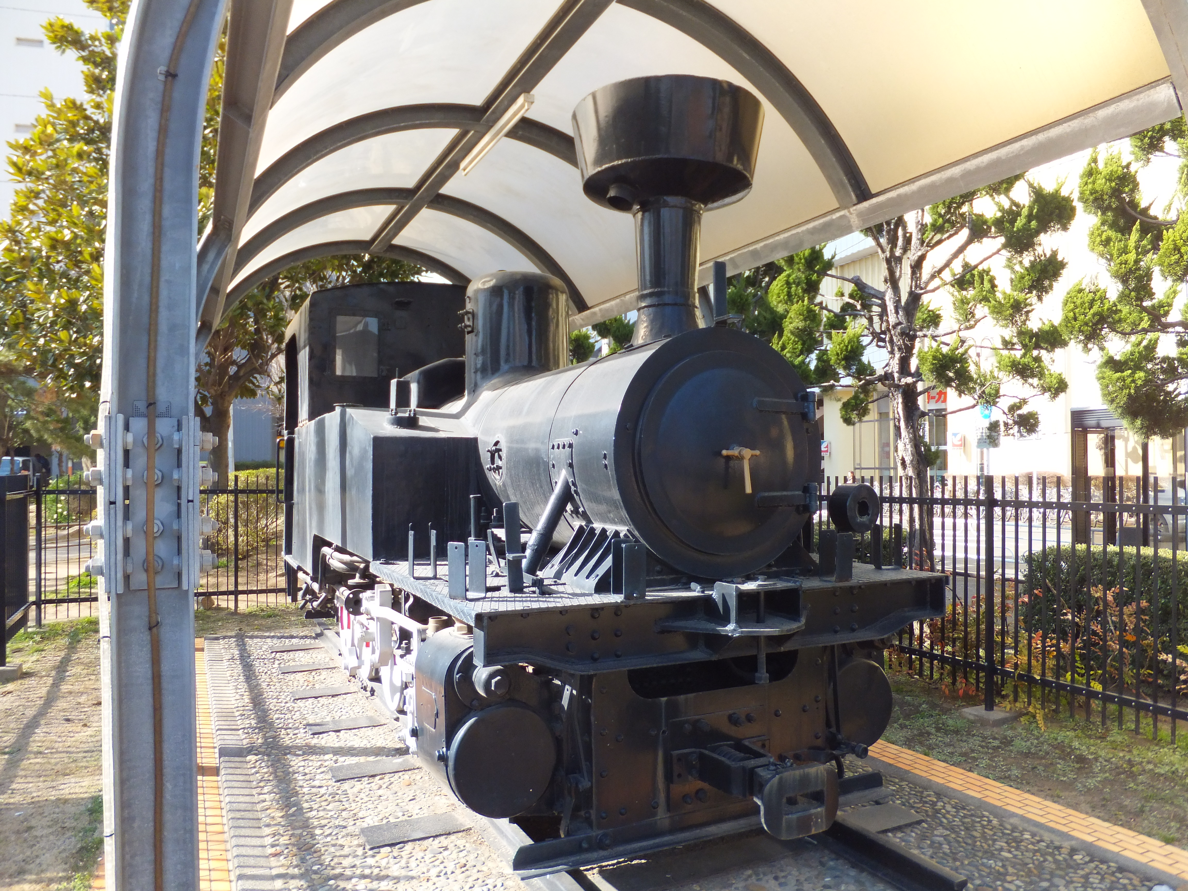 千葉県習志野市の津田沼一丁目公園に保存されているK2型蒸気機関車134号。習志野市が1994年にユネスコ村から譲受したもの。周りは柵で囲まれ機関車に立ち入ることはできない。